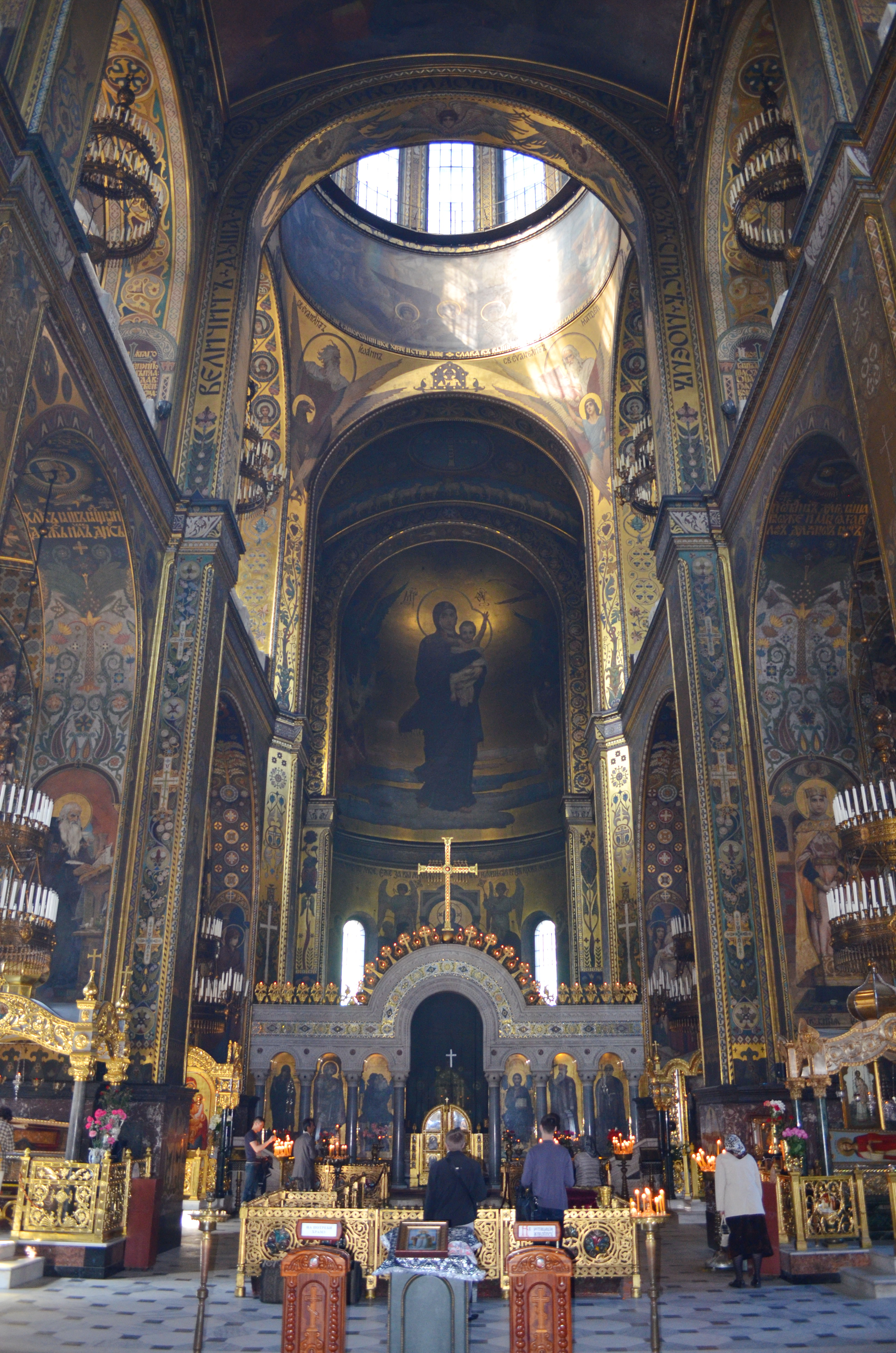 Володимирський кафедральний собор - головний храм УПЦ КП. 1862-82 рр.